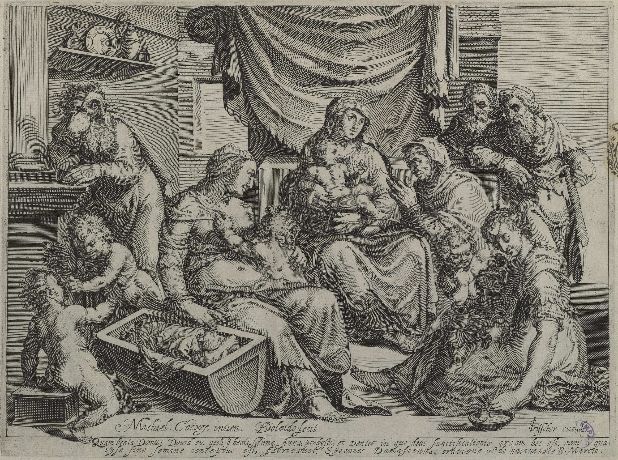 La Sagrada Familia. Grabado a buril de Bartholomeus Willemsz. Dolendo por dibujo de Michiel Coxcie. Firmado: Michiel Cocxy inven.; Dolendo fecit; C.Visscher excude. Biblioteca Nacional de España.